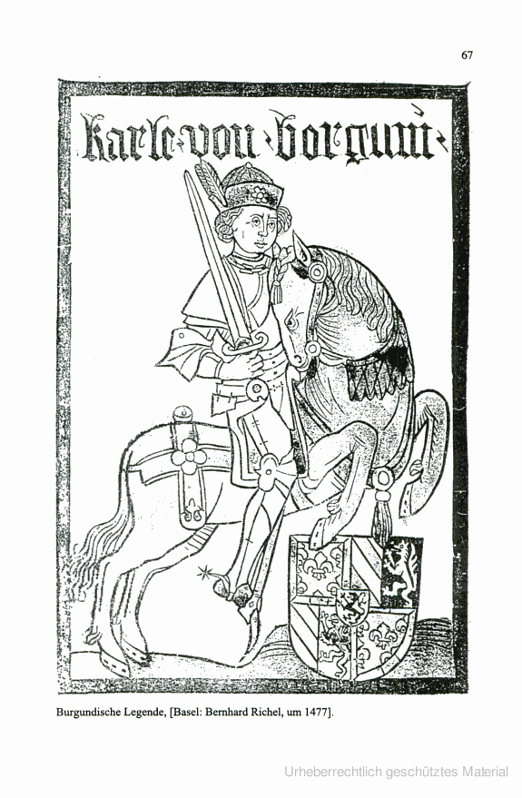 Titelholzschnitt der Burgundischen Legende, Basel 1477